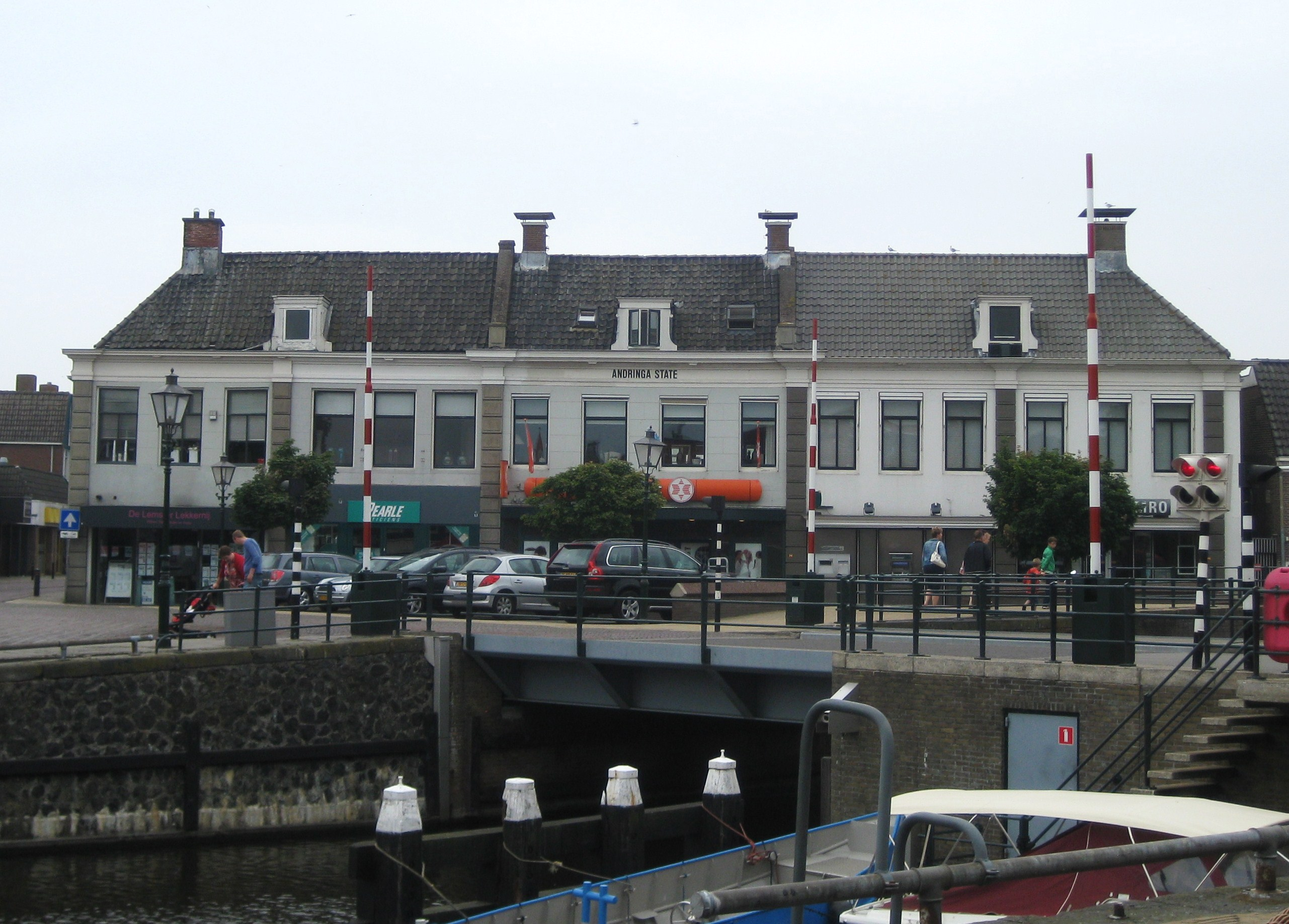 Andringa State, Schulpen 9-9a, Lemmer